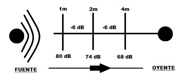 Ejemplo de la pérdida de intensidad acústica en una fuente Puntual.